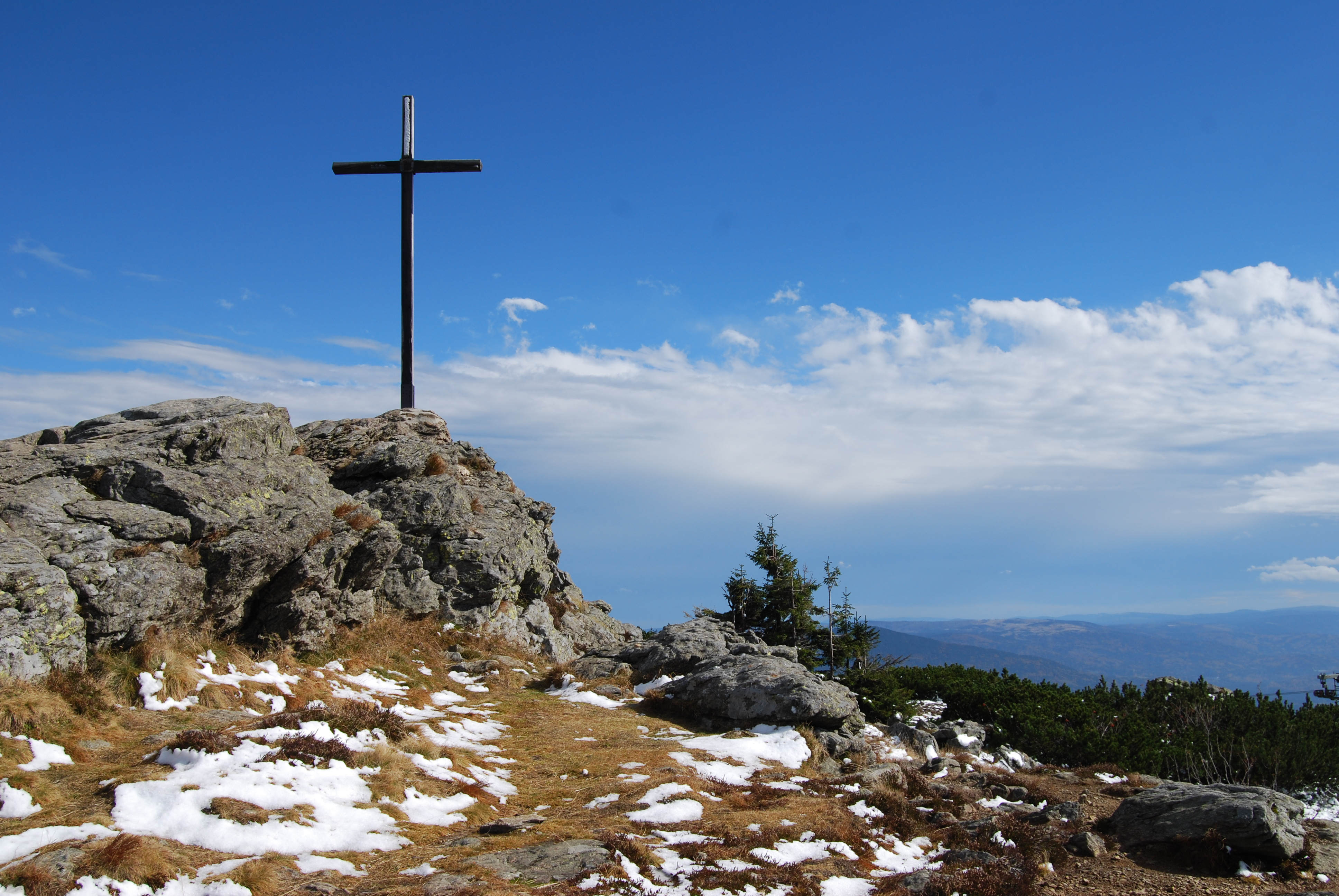 Česky: Kříž na vrcholu. Velký Javor (Großer Arber)- Pohoří Šumava. Německo. - OpenStreetMap (Info)